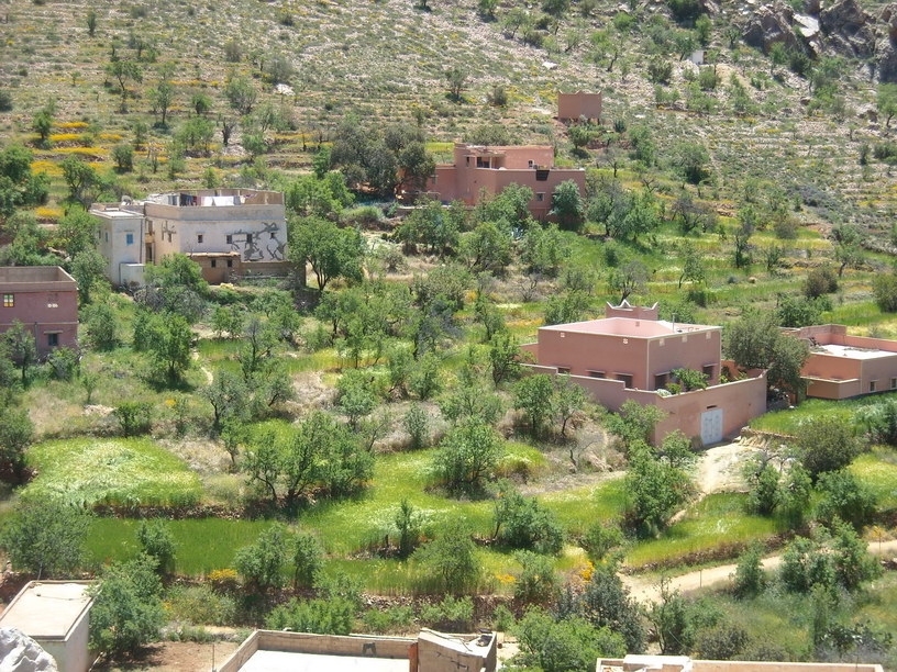 Photos de Douar Tagzen Tagzen